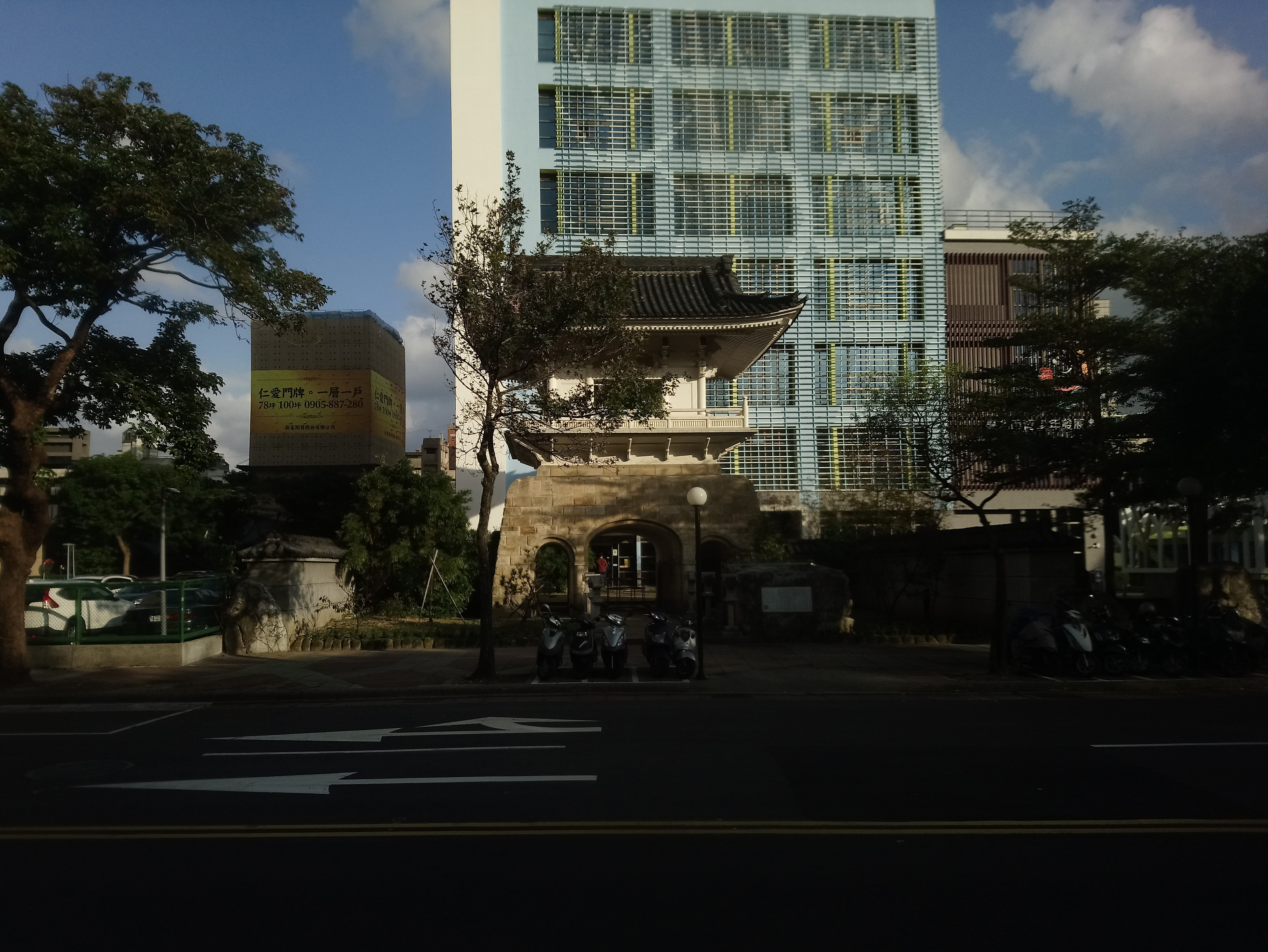 自臺北市林森南路上看曹洞宗大本山臺灣別院鐘樓與臺北市青少年發展處。